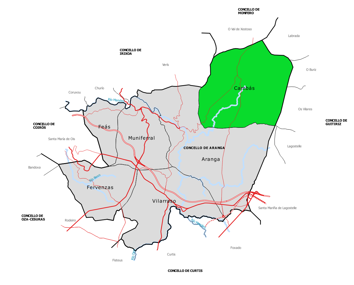 Mapa da parroquia de Cambás no concello de Aranga (Galiza).